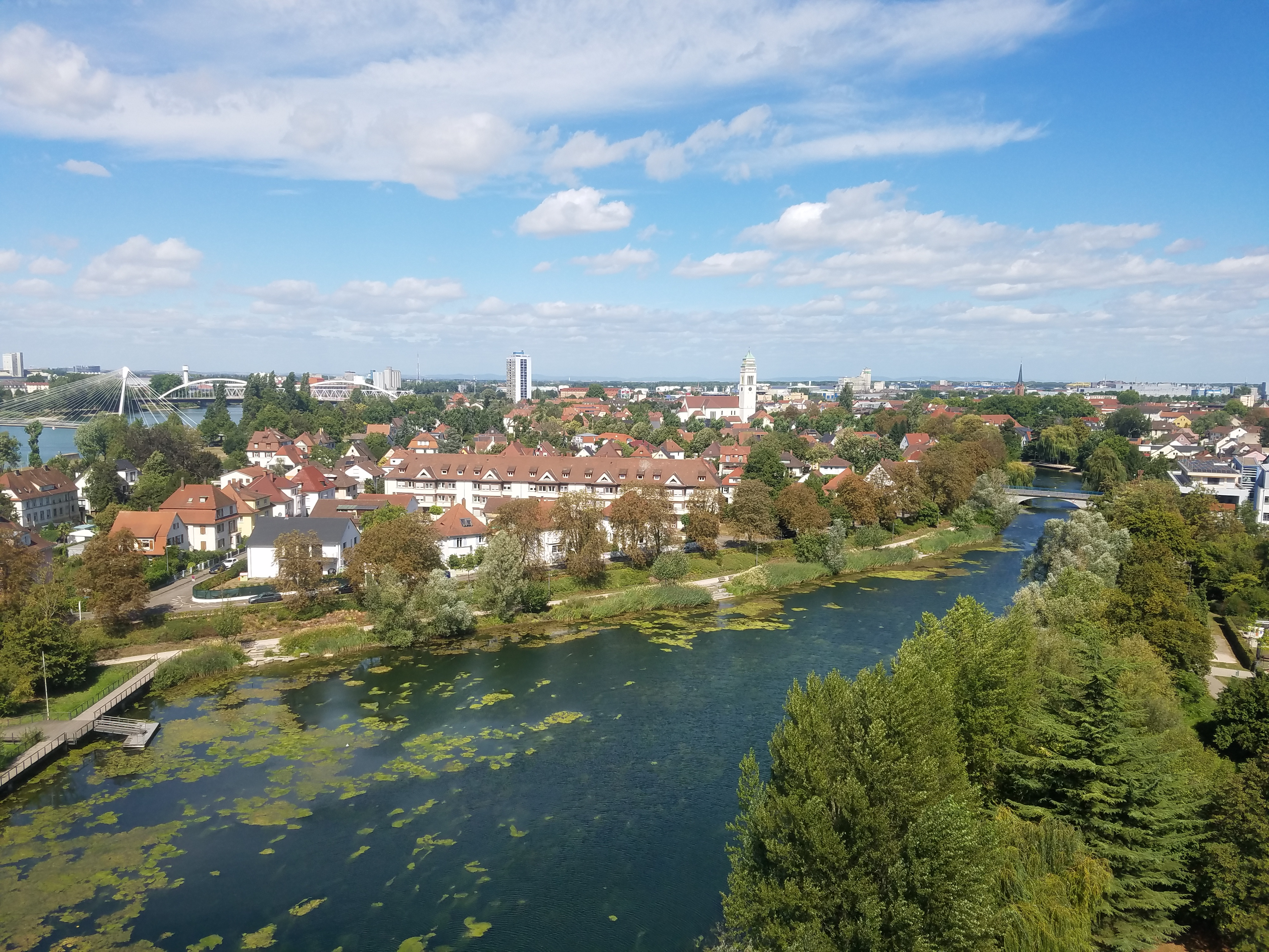 Blick auf Kehl vom Weißtannenturm